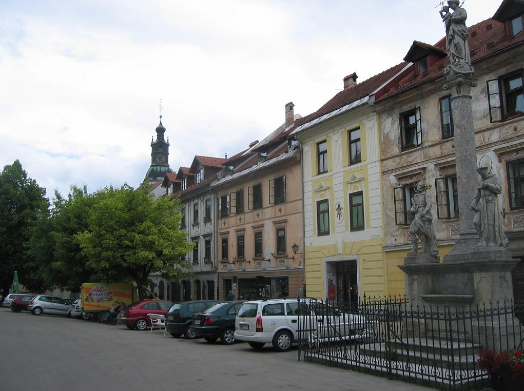 Mestni trg, Škofja Loka, Slovenia photo:Ziga 10:47, 5 June 2006 (UTC)